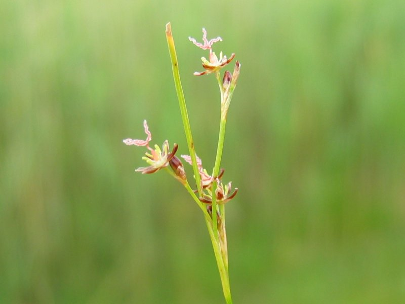 Bodden-Binse Juncus gerardii, Zingst